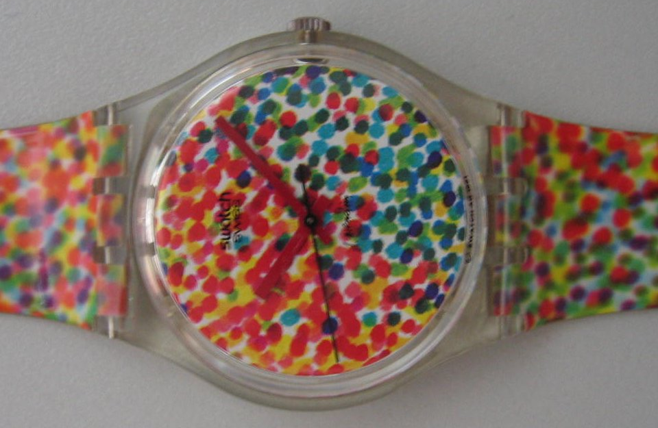 Armbanduhr "Lots of Dots" der Marke "Swatch" von Alessandro Mendini.